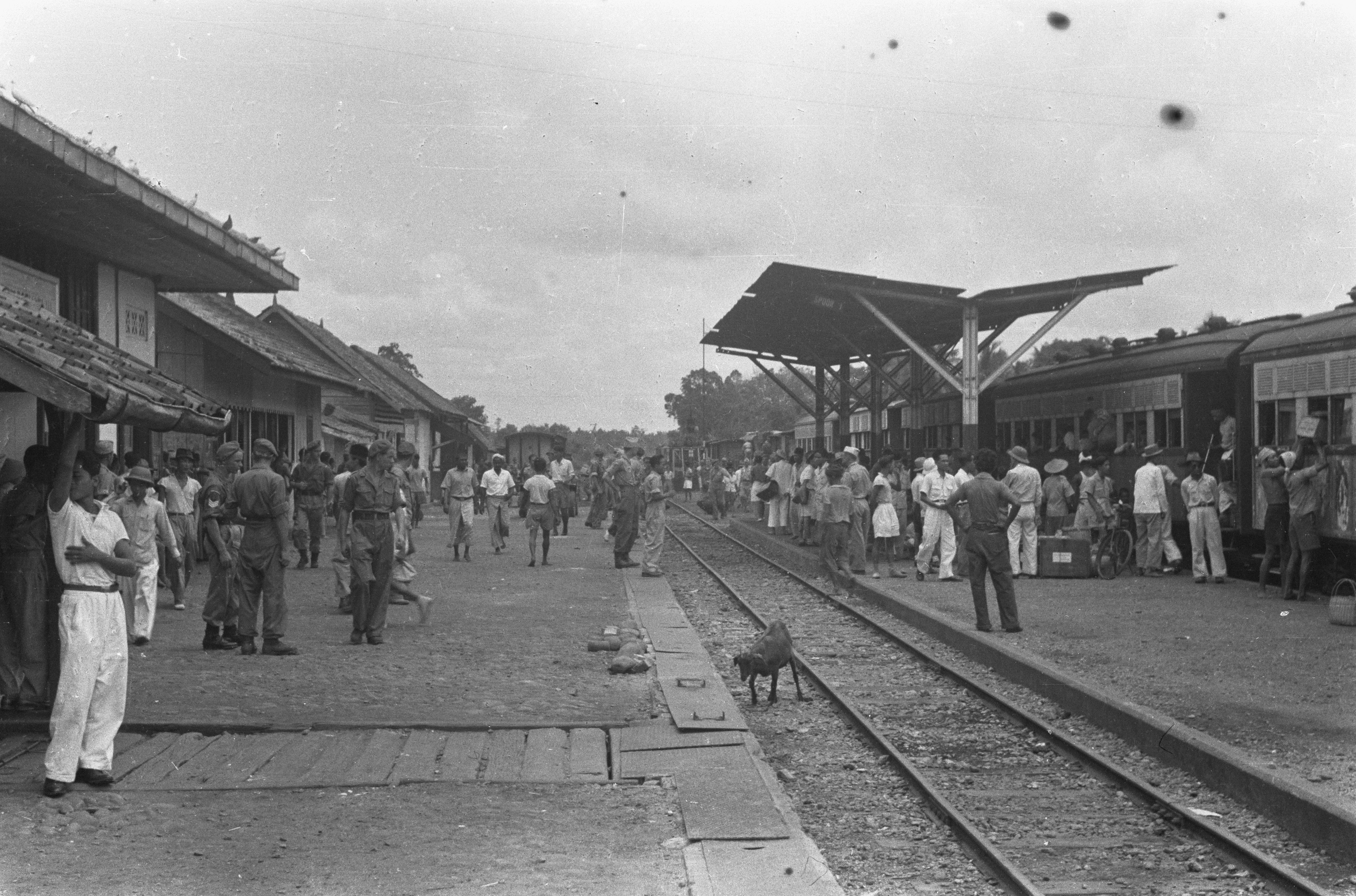 Collectie / Archief : Fotocollectie Dienst voor Legercontacten Indonesië Reportage / Serie : [DLC] Stoottroepen bij Praboemoelih Beschrijving : Praboemoelih: Het treinverkeer tussen Lahat en Palembang functioneert normaal, zij het natuurlijk onder voordurende militaire bewaking. De drukte op het station Prabamoelih wanneer de trein uit Palembang arriveert. Datum : 23 oktober 1947 Locatie : Indonesië, Nederlands-Indië Fotograaf : Taillie, J.C. / DLC Auteursrechthebbende : Nationaal Archief Materiaalsoort : Negatief (zwart/wit) Nummer archiefinventaris : bekijk toegang 2.24.04.03 Bestanddeelnummer : 404-6-7